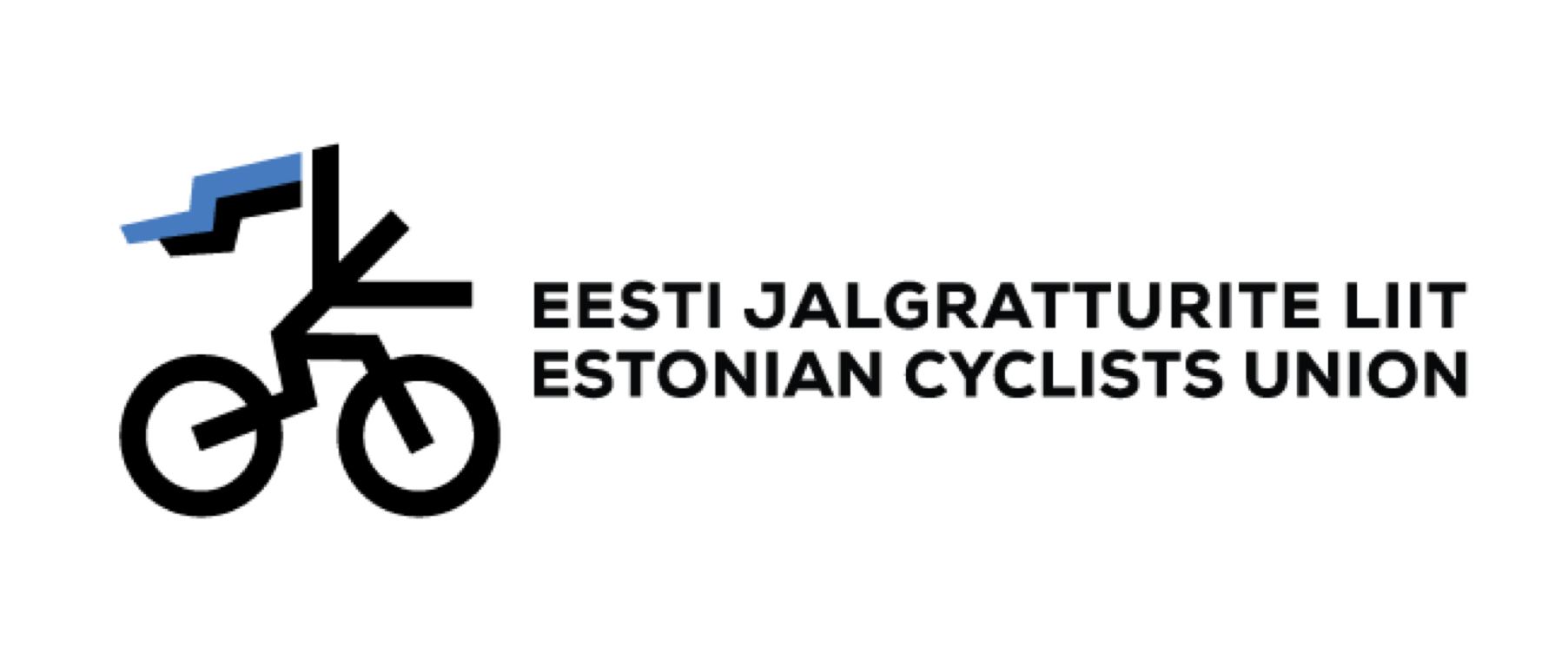 EJL logo